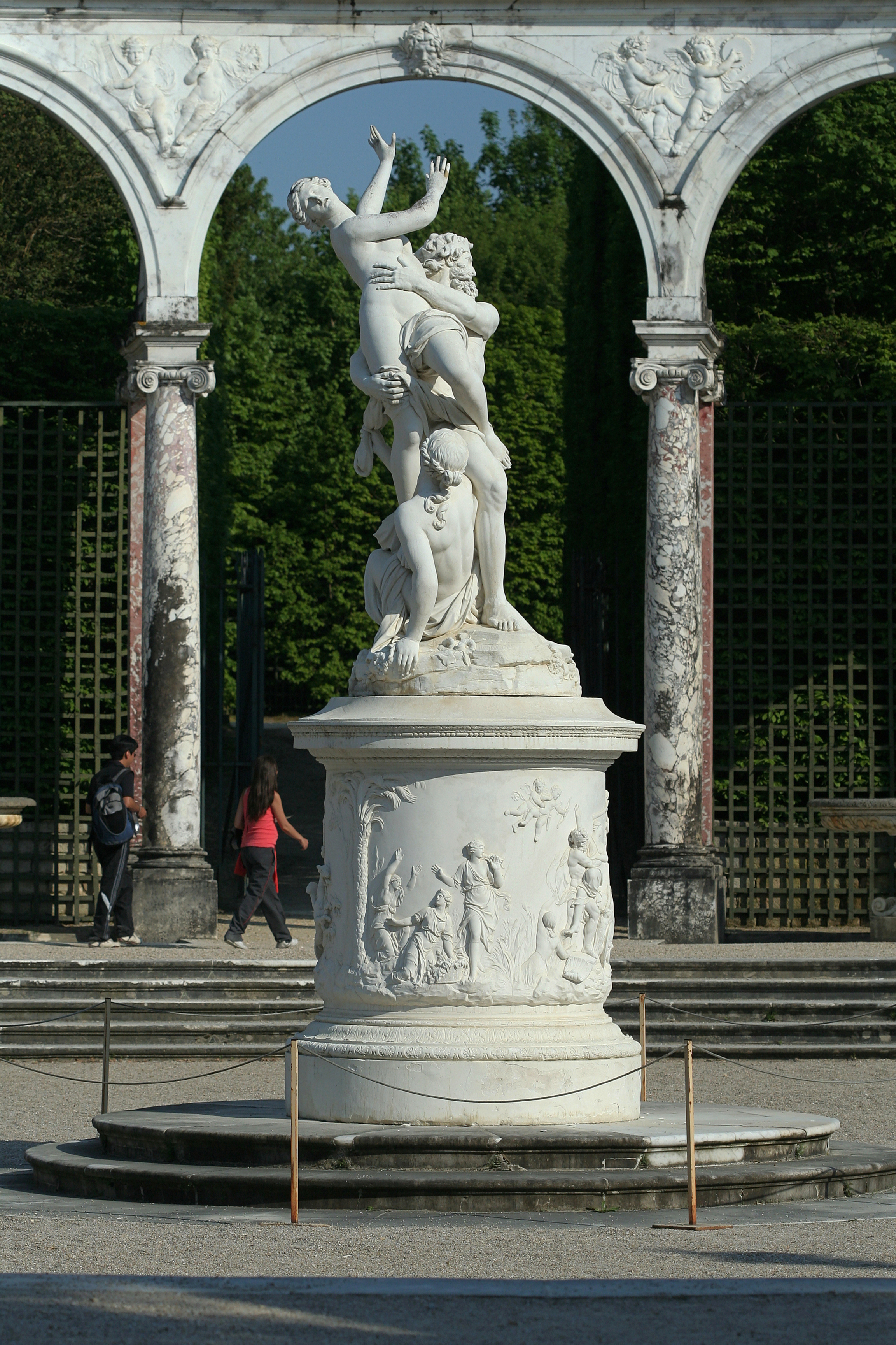 Parc de Versailles, bosquet de la Colonnade. Enlèvement de Proserpine par Pluton, moulage du groupe sculpté de François Girardon, 1677-1699.